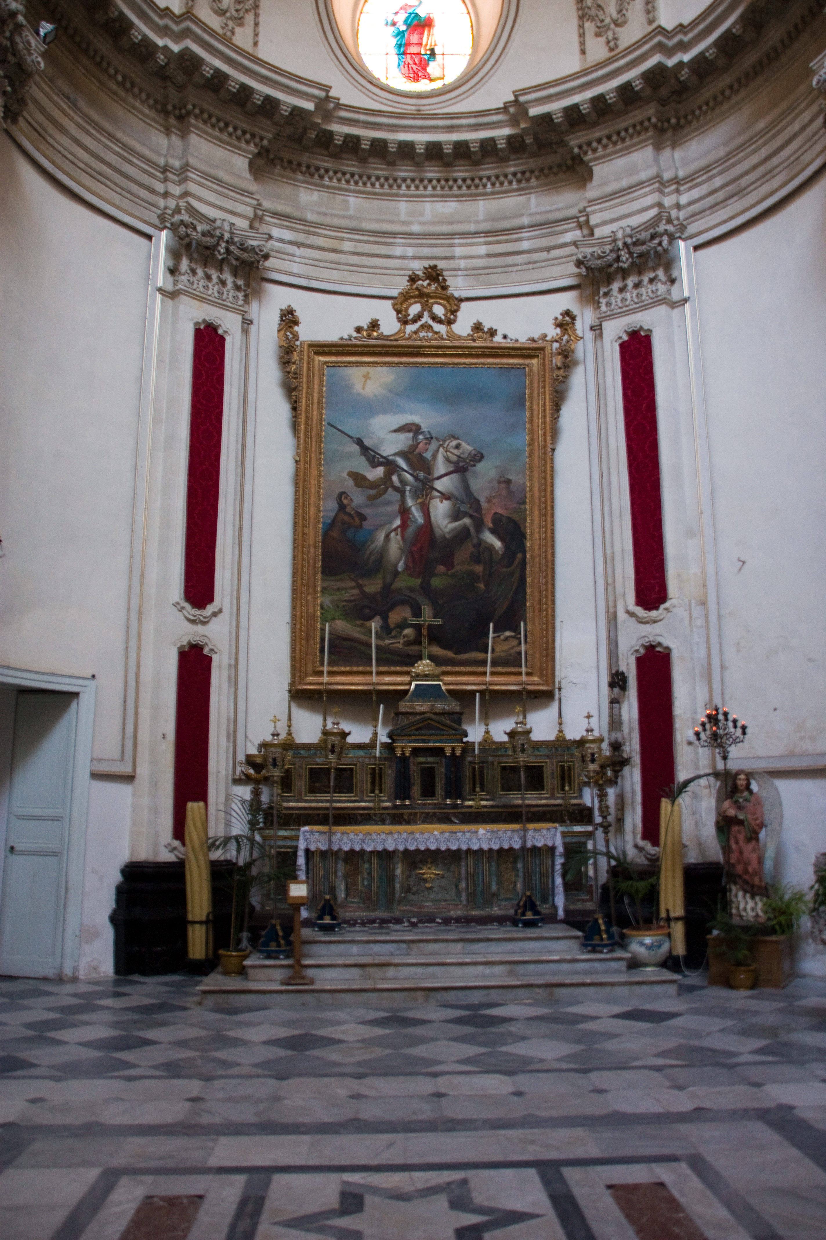 Duomo di S. Giorgio, Ragusa Ibla, Sicile, Italie